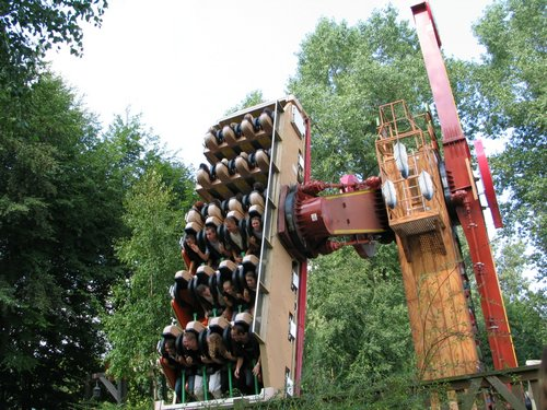 Attractie Walibi World